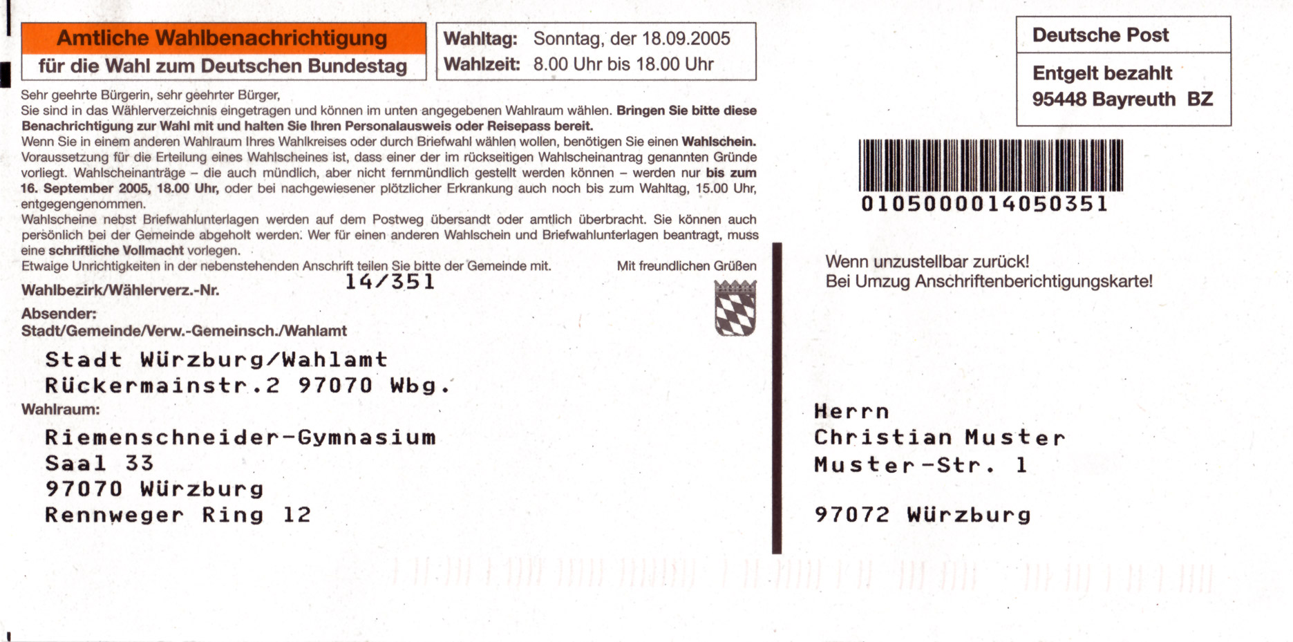 Wahlbenachrichtigung der Stadt Würzburg zur Bundestagswahl 2005